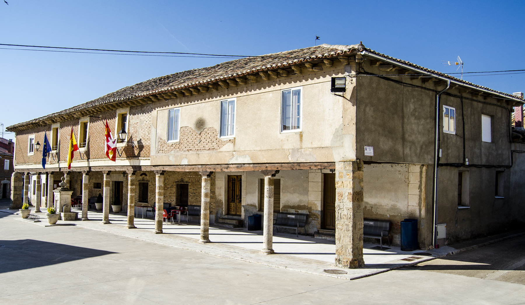 Ayuntamiento, edificio de servicios múltiples y soportal. Padilla de Abajo. 2016.